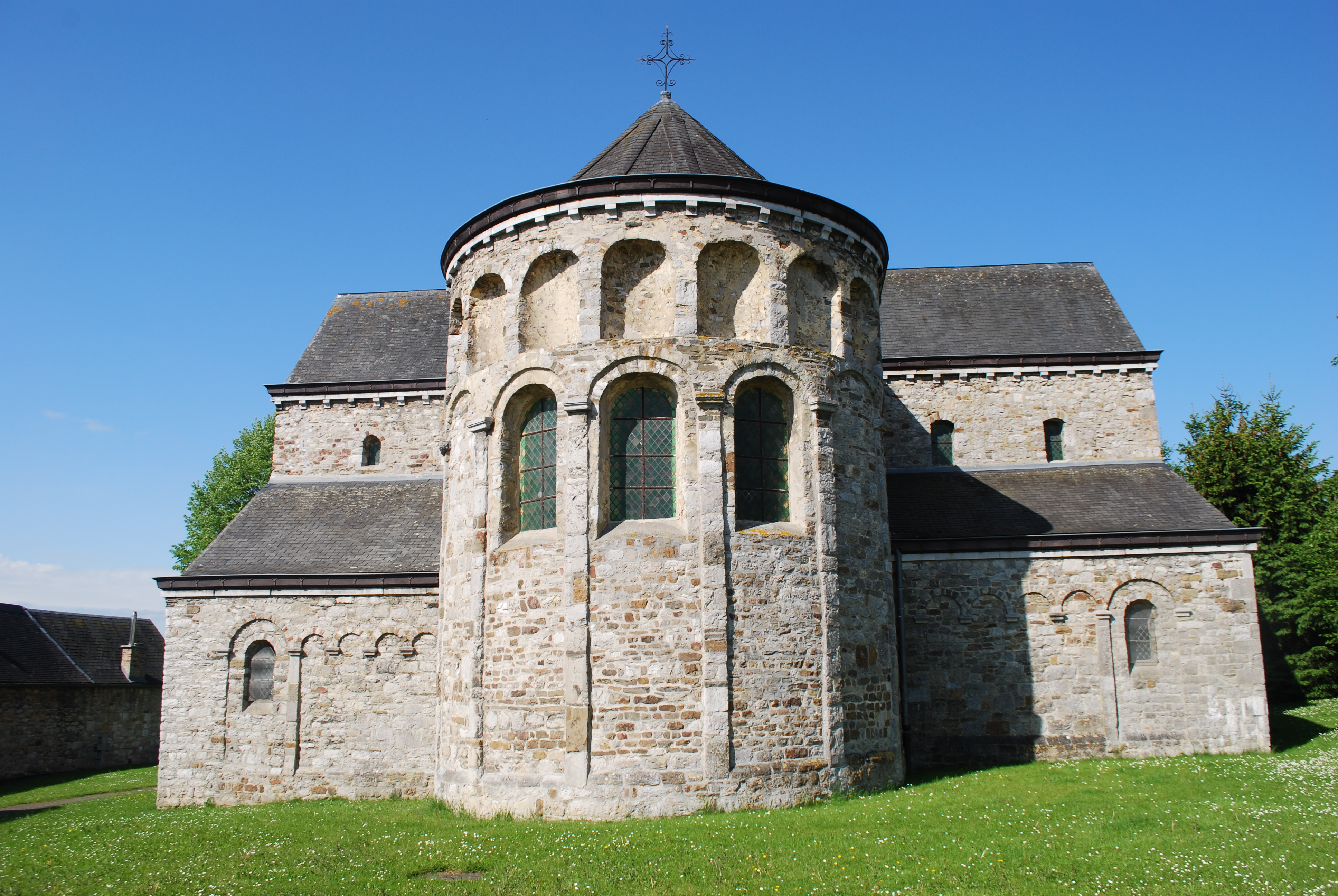 Vue de l'église Saint-Pierre à Xhignesse.